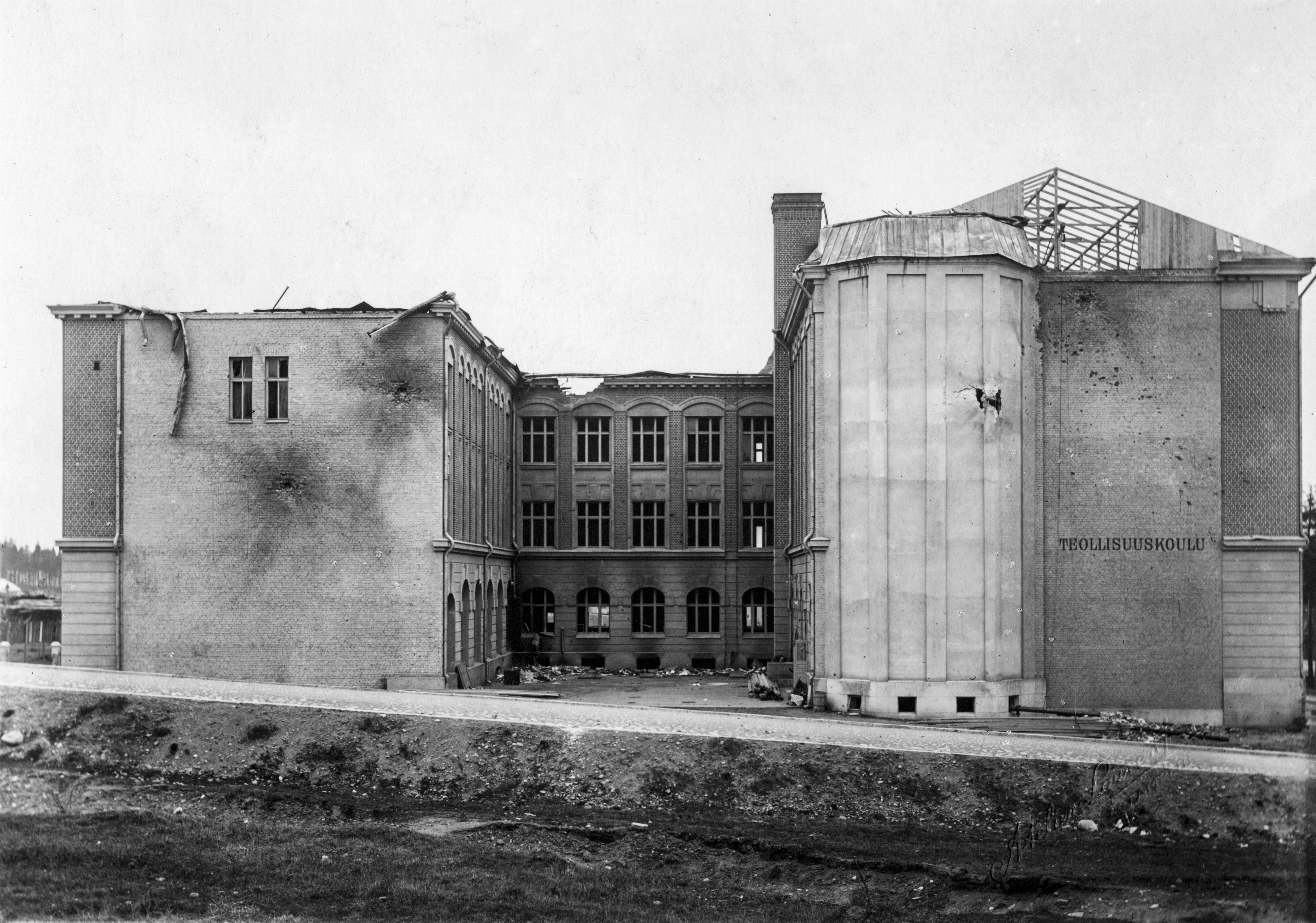 CC-BY Tampere 1918, kuvaaja Atelier Laurent, Vapriikin kuva-arkisto. Finnish Civil War 1918, Photographer Atelier Laurent, Vapriikki Photo Archives.